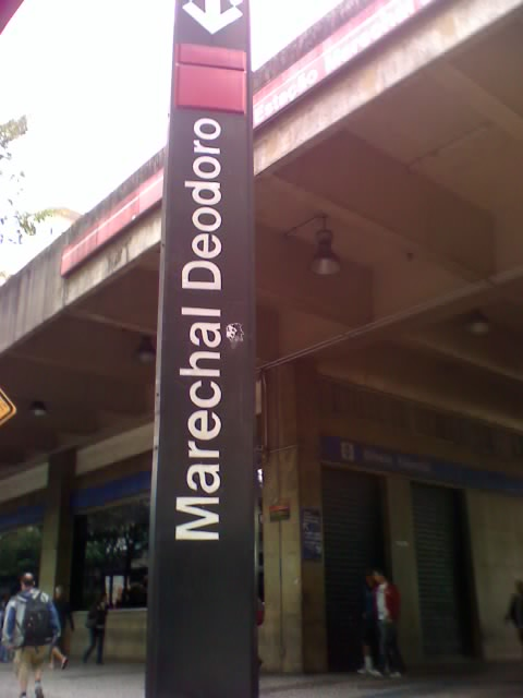 Tótem da Estação Marechal Deodoro